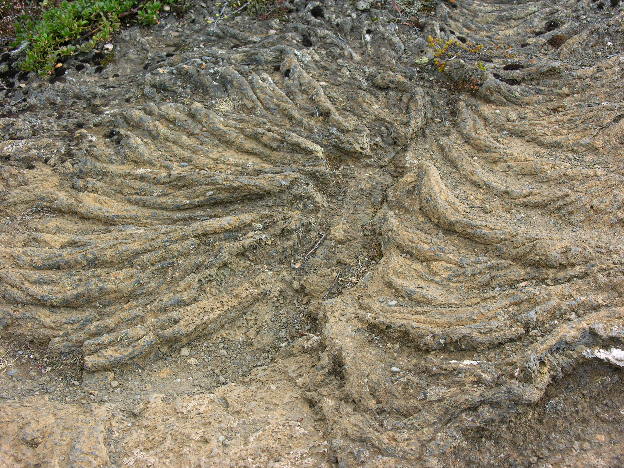 Iceland, Hraunfossar